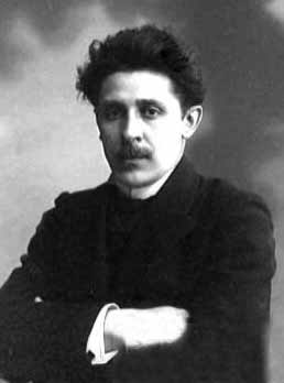 Георгий Иванович Чулков (1879—1939) поэт, прозаик, литературный критик.